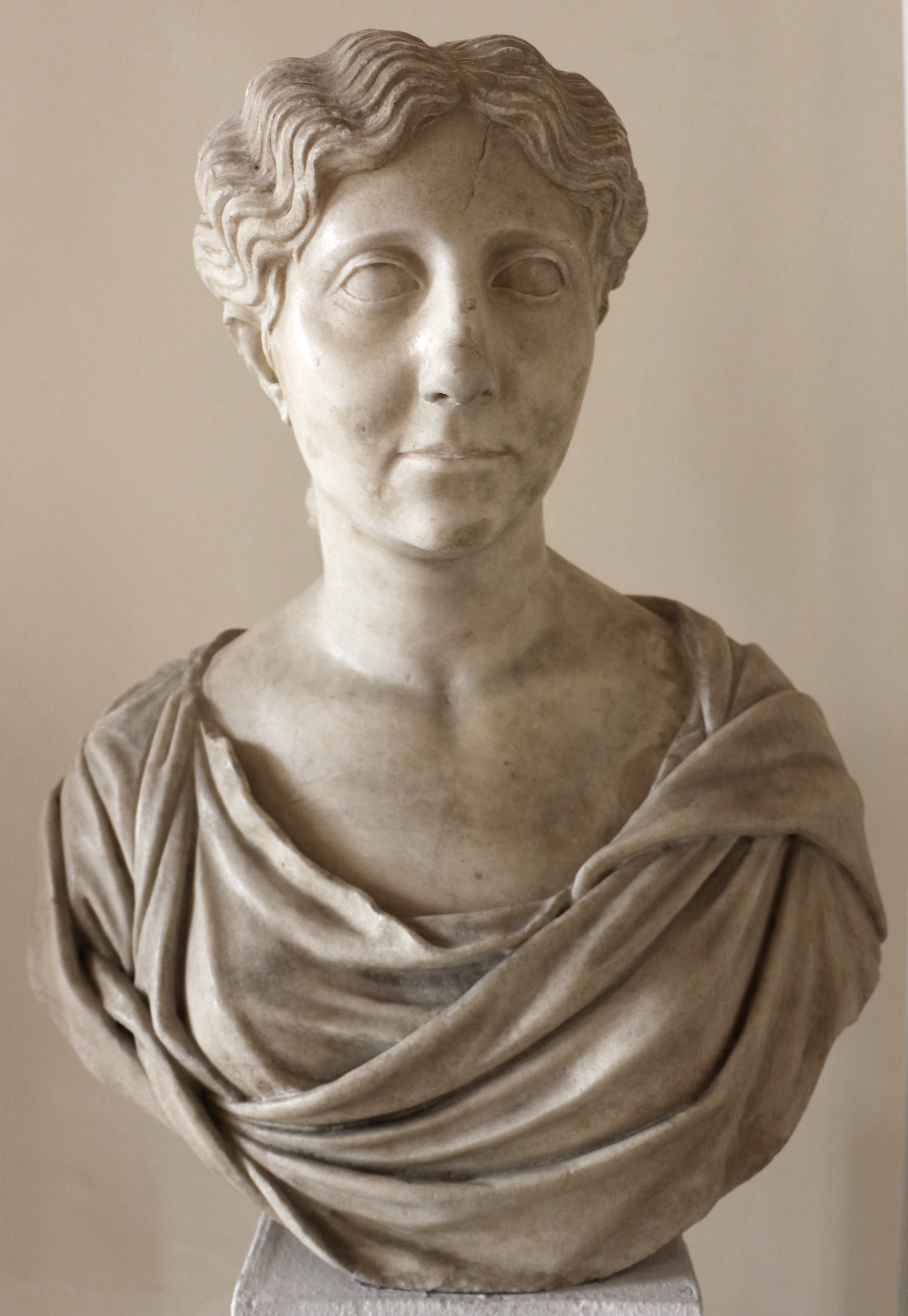 Museo Archeologico Nazionale This is a photo of a monument which is part of cultural heritage of Italy.